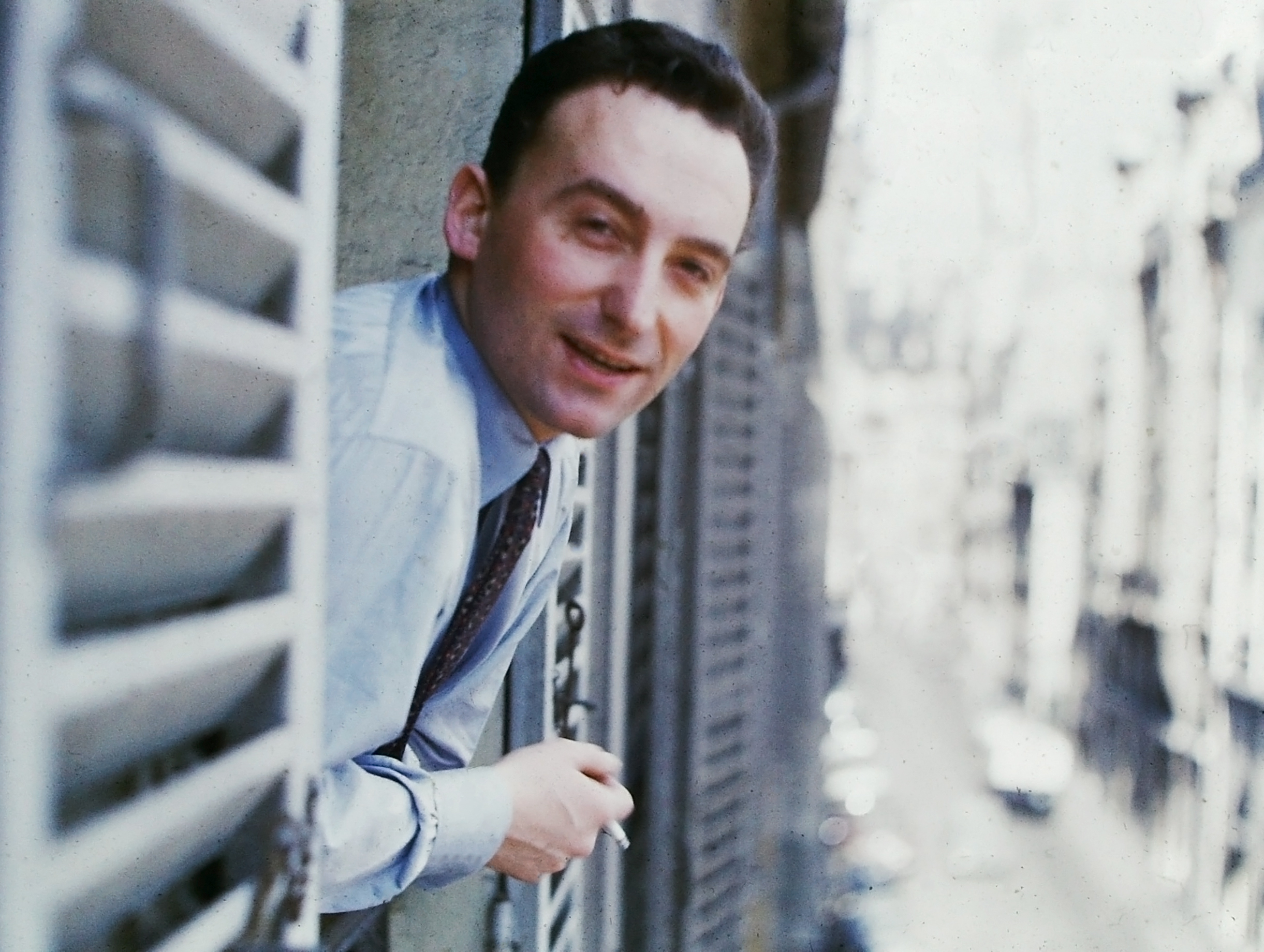 photographie de Pierre Barillet à Paris, année 1948